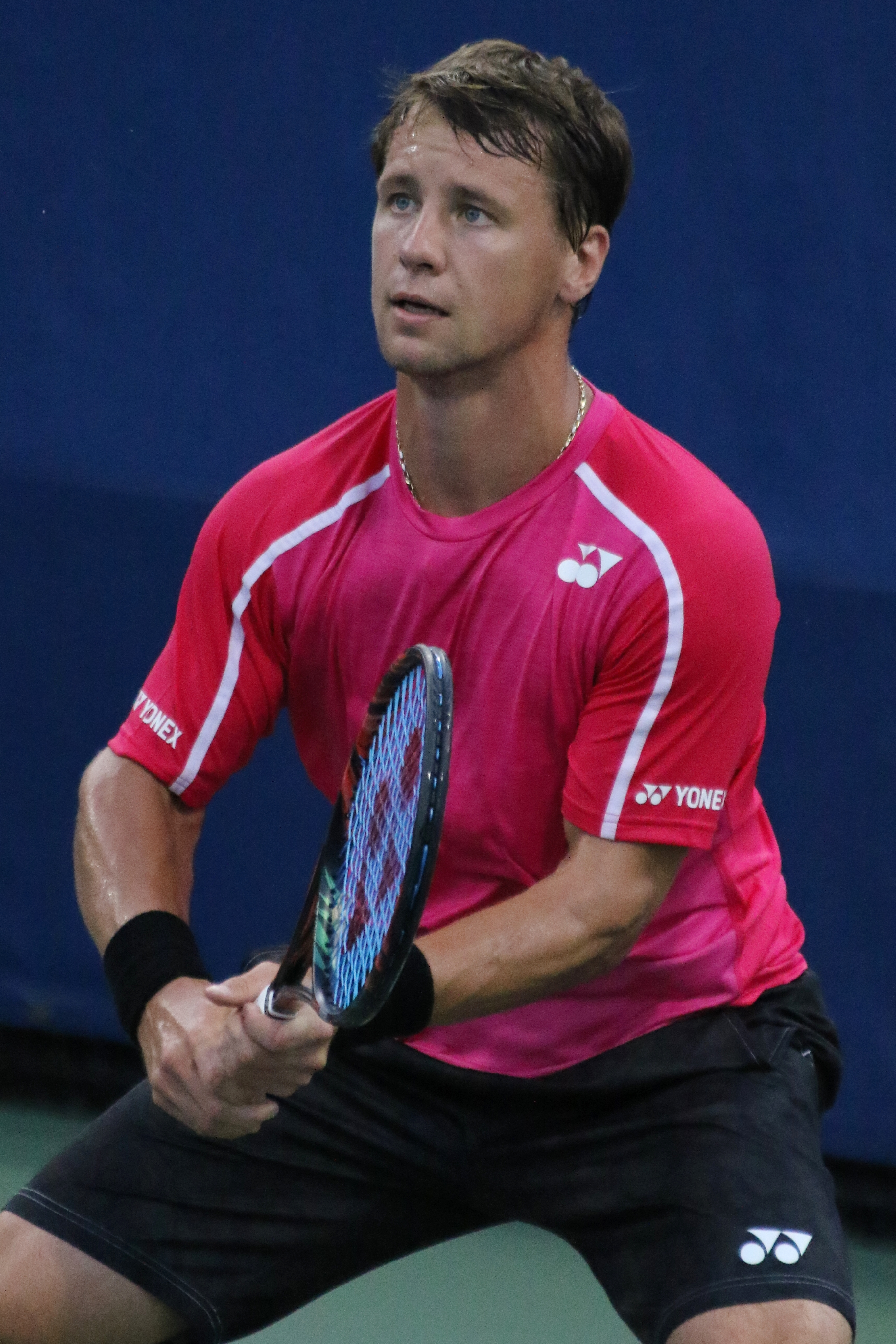 Berankis US16 (63)